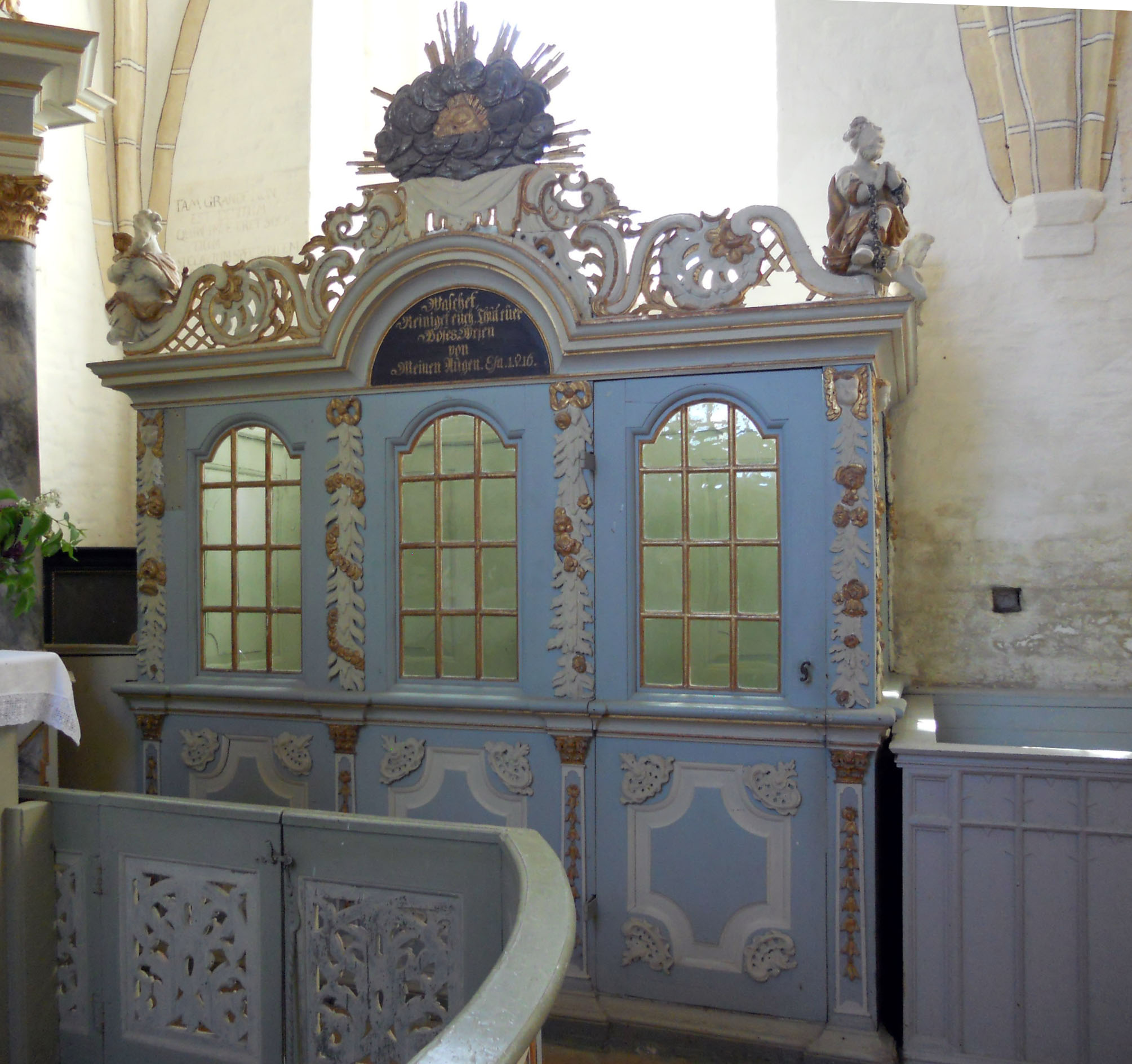 Patronatsstuhl in der Wegekirche St. Katharinen Trent